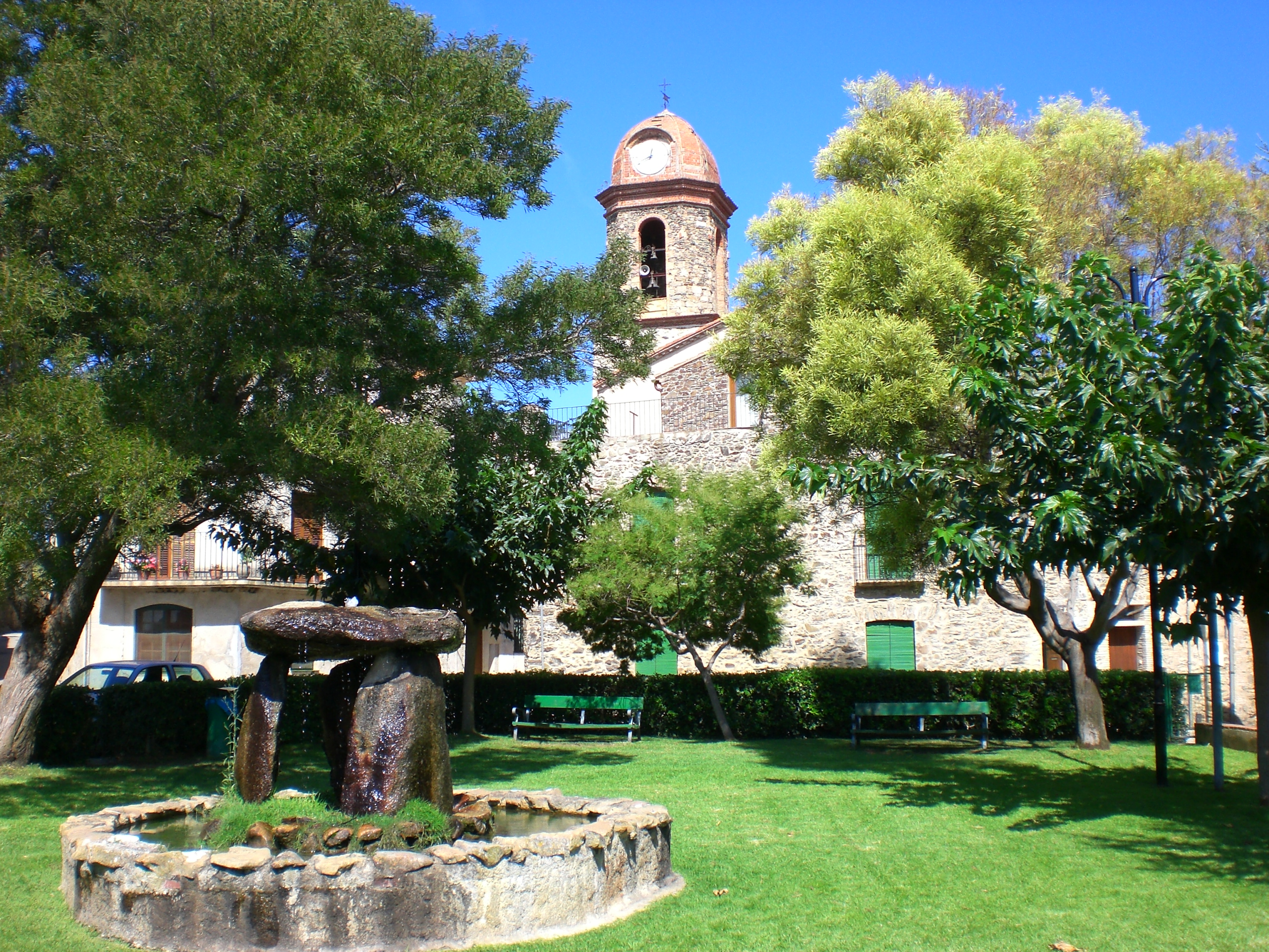 Plaça del Dolmen, un dels racons més bonics del poble d'Espolla. on s'hi va instal·lar un dolmen artificial.